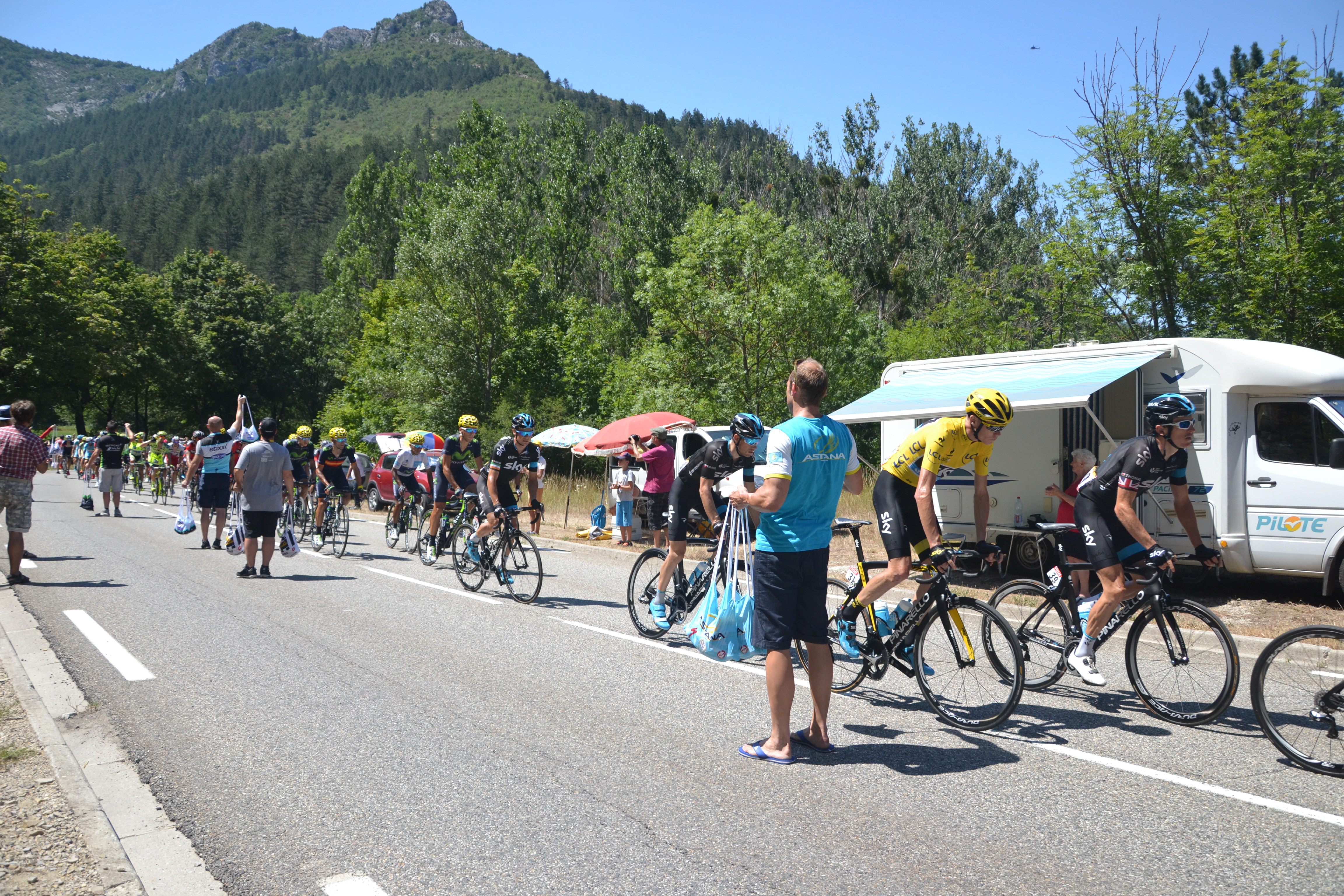 Durant la 16 ème étape du Tour de France 2015